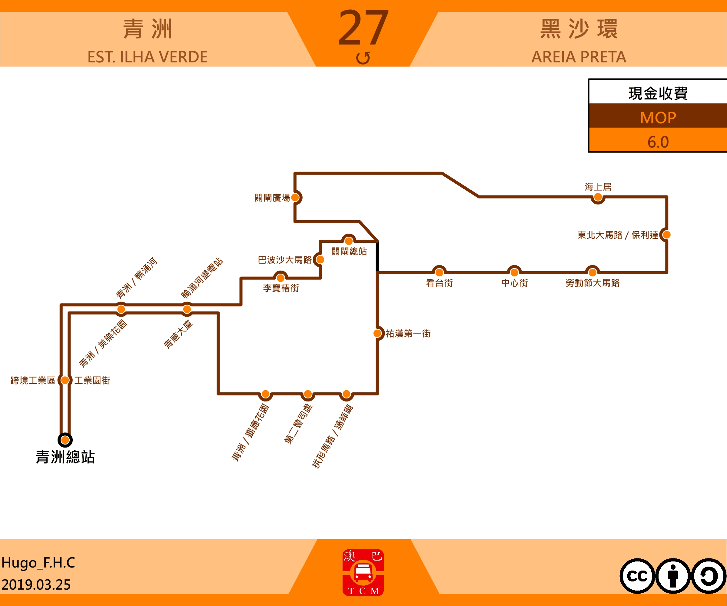 澳門巴士27走線圖